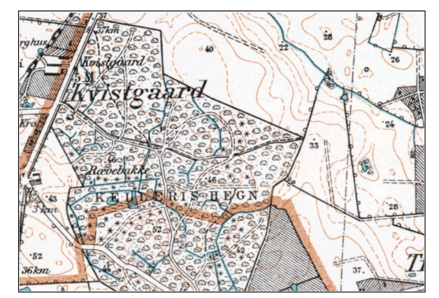 Kelleris Hegn